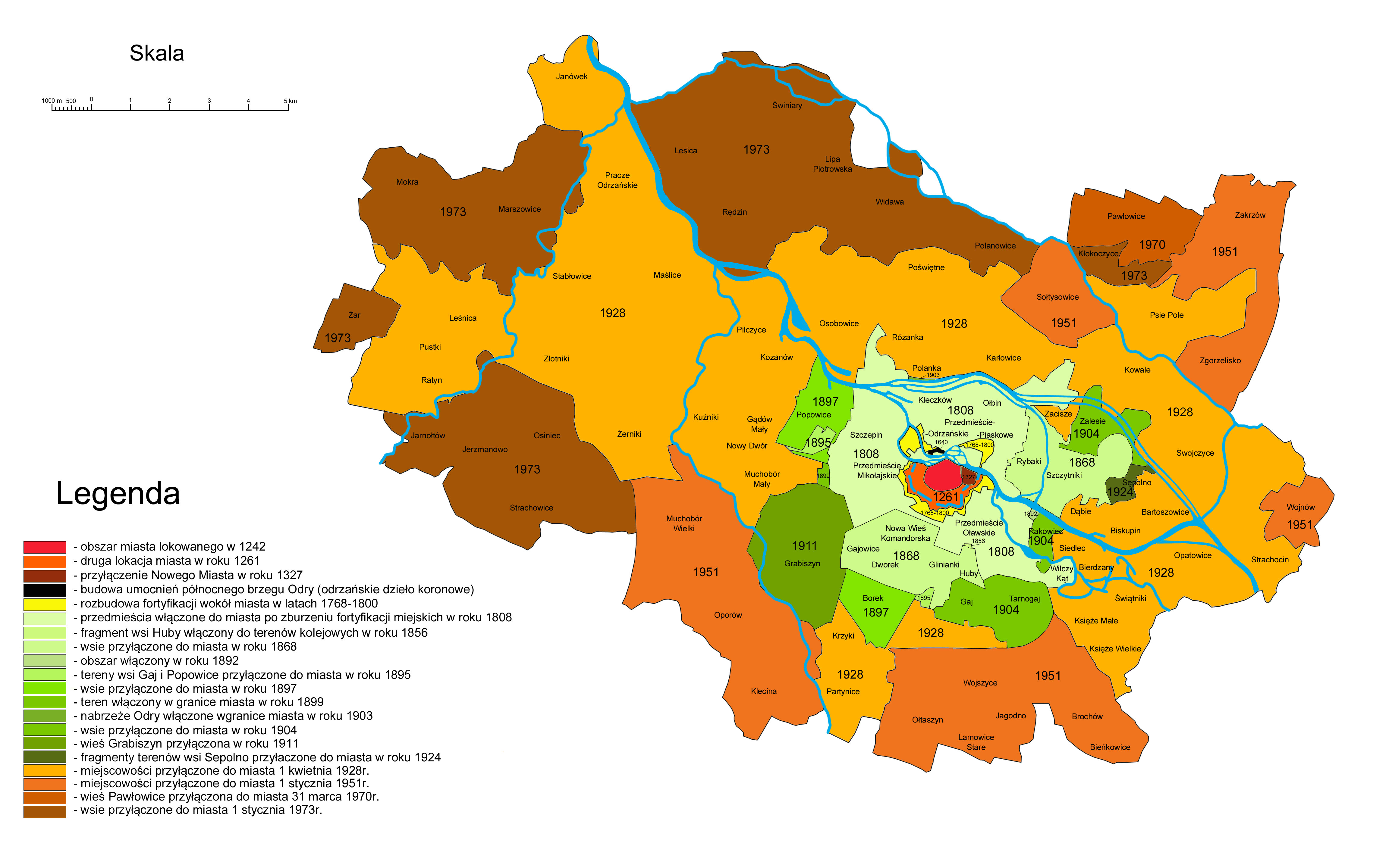 Mapa rozwoju terytorialnego Wrocławia wykonana na podstawie "Plan der Hauptstadt Breslau" z roku 1932 oraz "Encyklopedii Wrocławia"